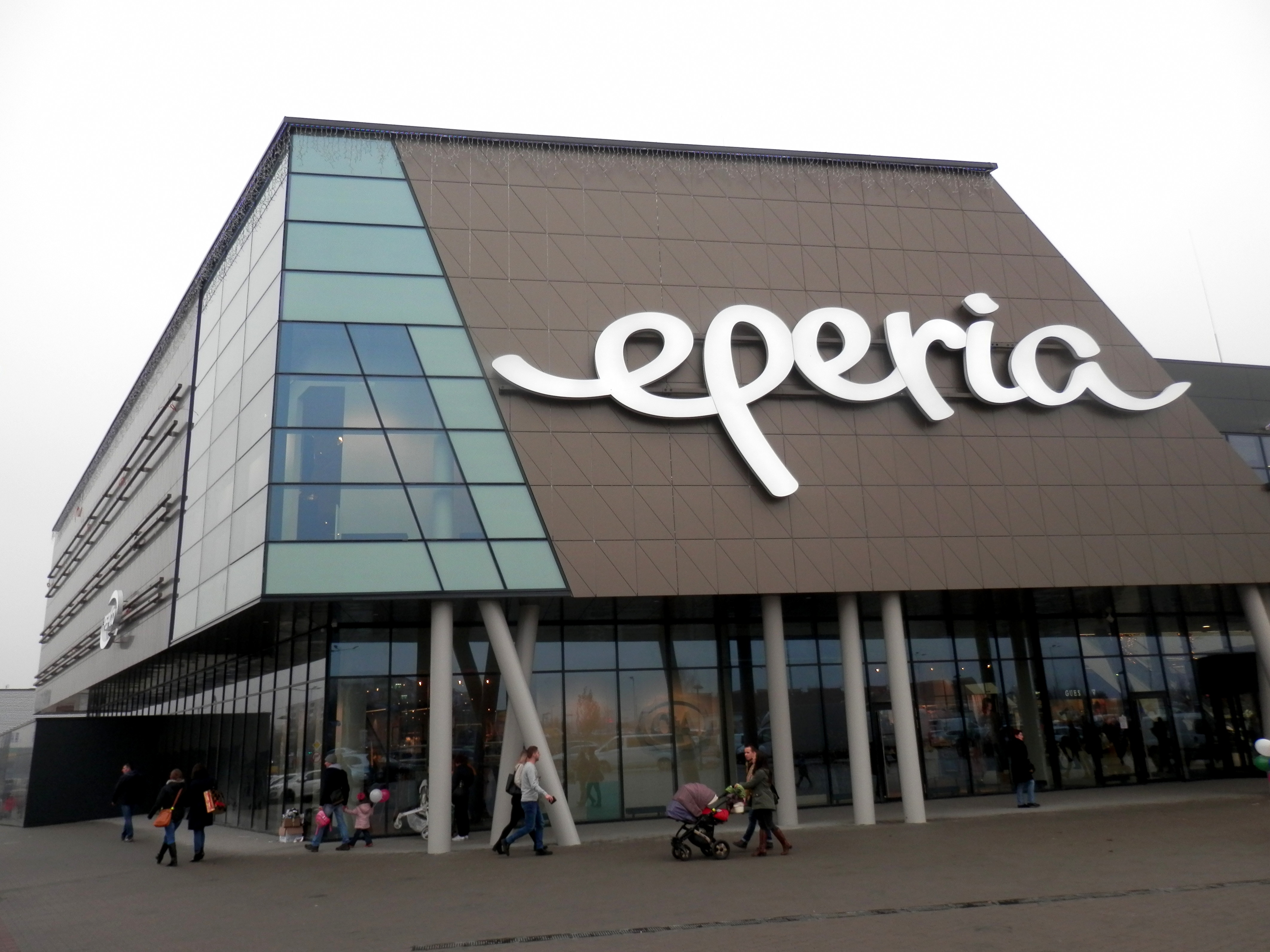 Exteriérové priestory obchodného centra Eperia Prešov, ktoré bolo otvorené 24.11.2017. Mesto Prešov, Slovensko.